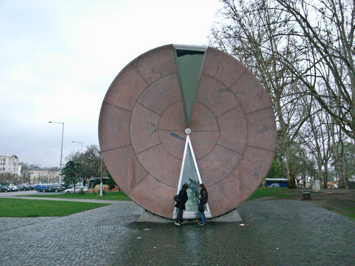 Időkerék, 56-osok tere, Budapest